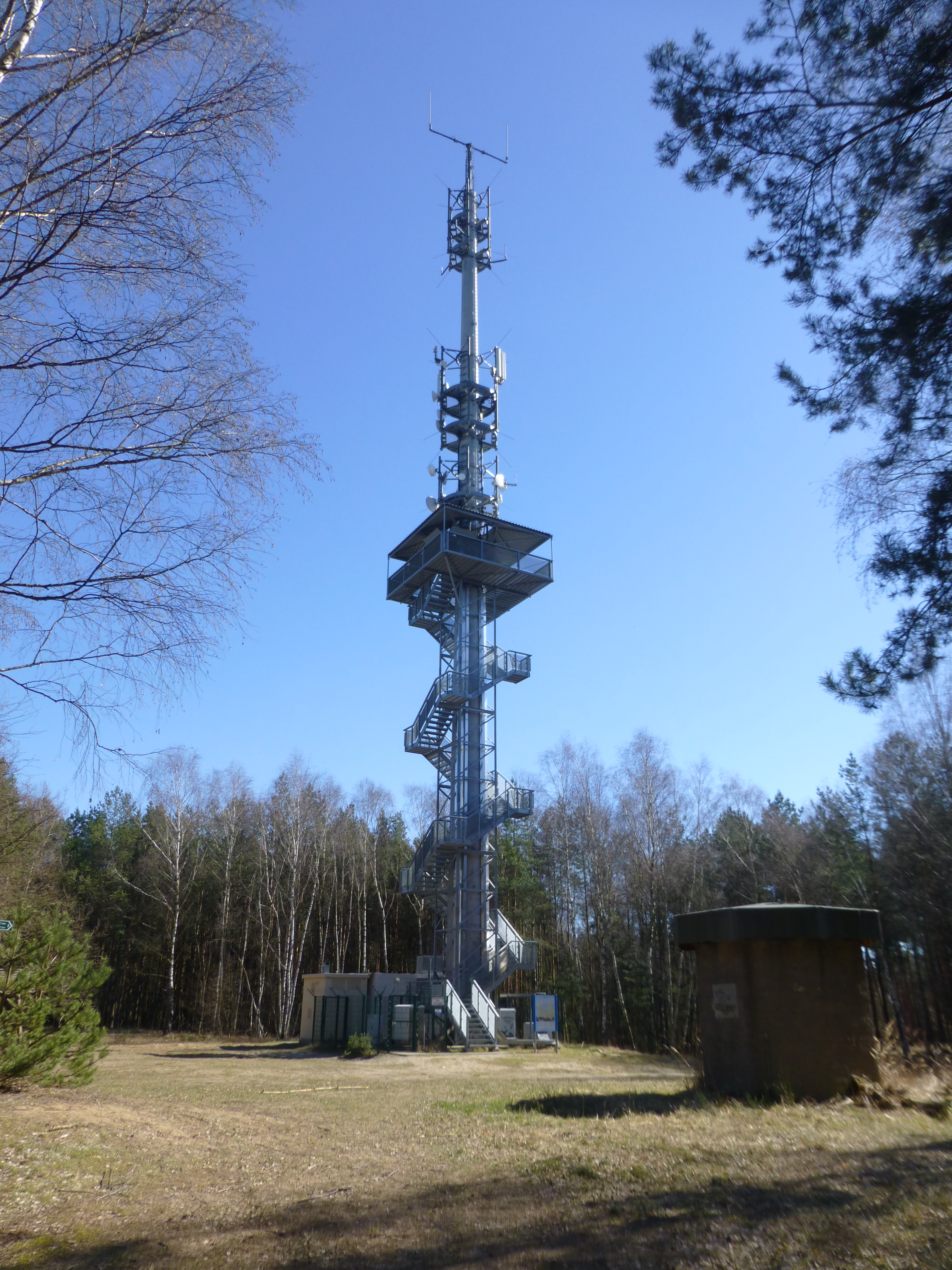 Aussichtsturm Wietkiekenberg bei Ferch (Schwielowsee); im Vordergrund rechts der Sockelbau des früheren Feuerwachturms